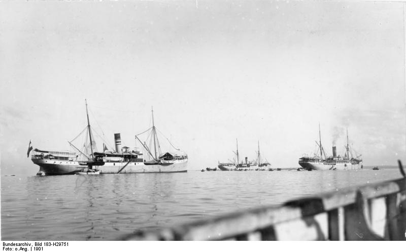 ADN-ZB/Archiv Dampfer der Deutsch-Ostafrika-Linie im Hafen von Sansibar im Jahre 1901